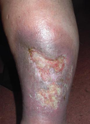 Ulcus cruris, eigene Fotografie (Robodoc)